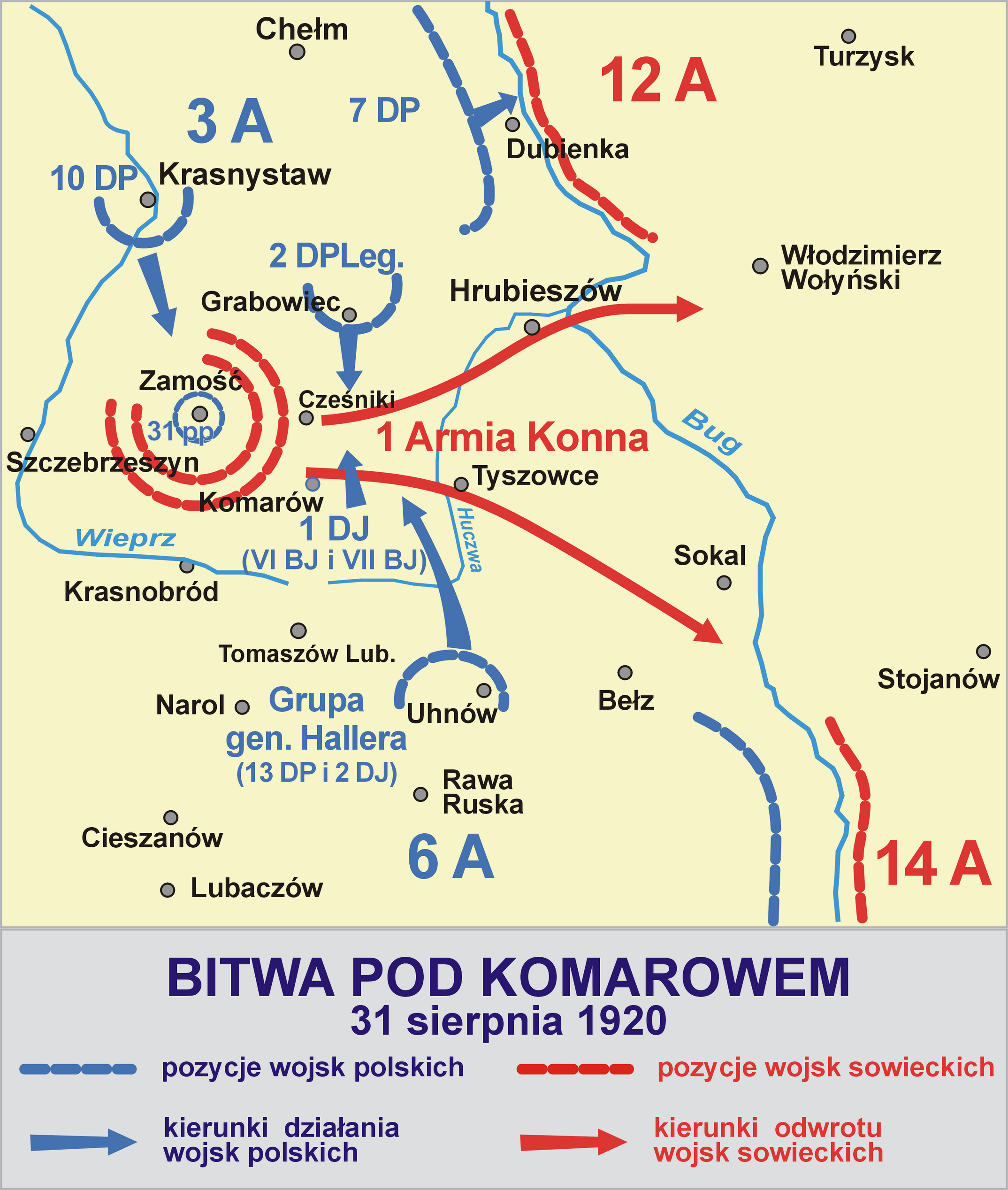 Bitwa pod Komarowem - 1920-08-31